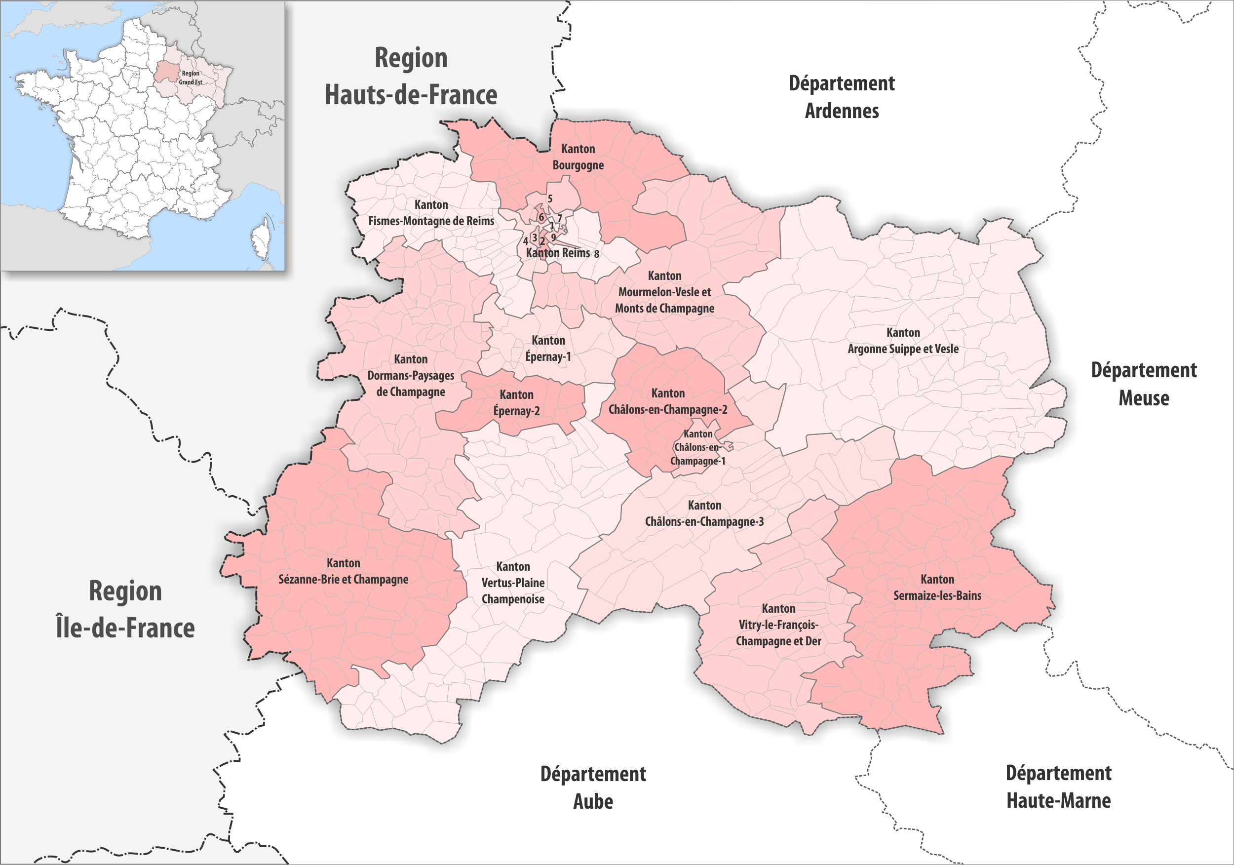 Gemeinden und Kantone im Departement Marne